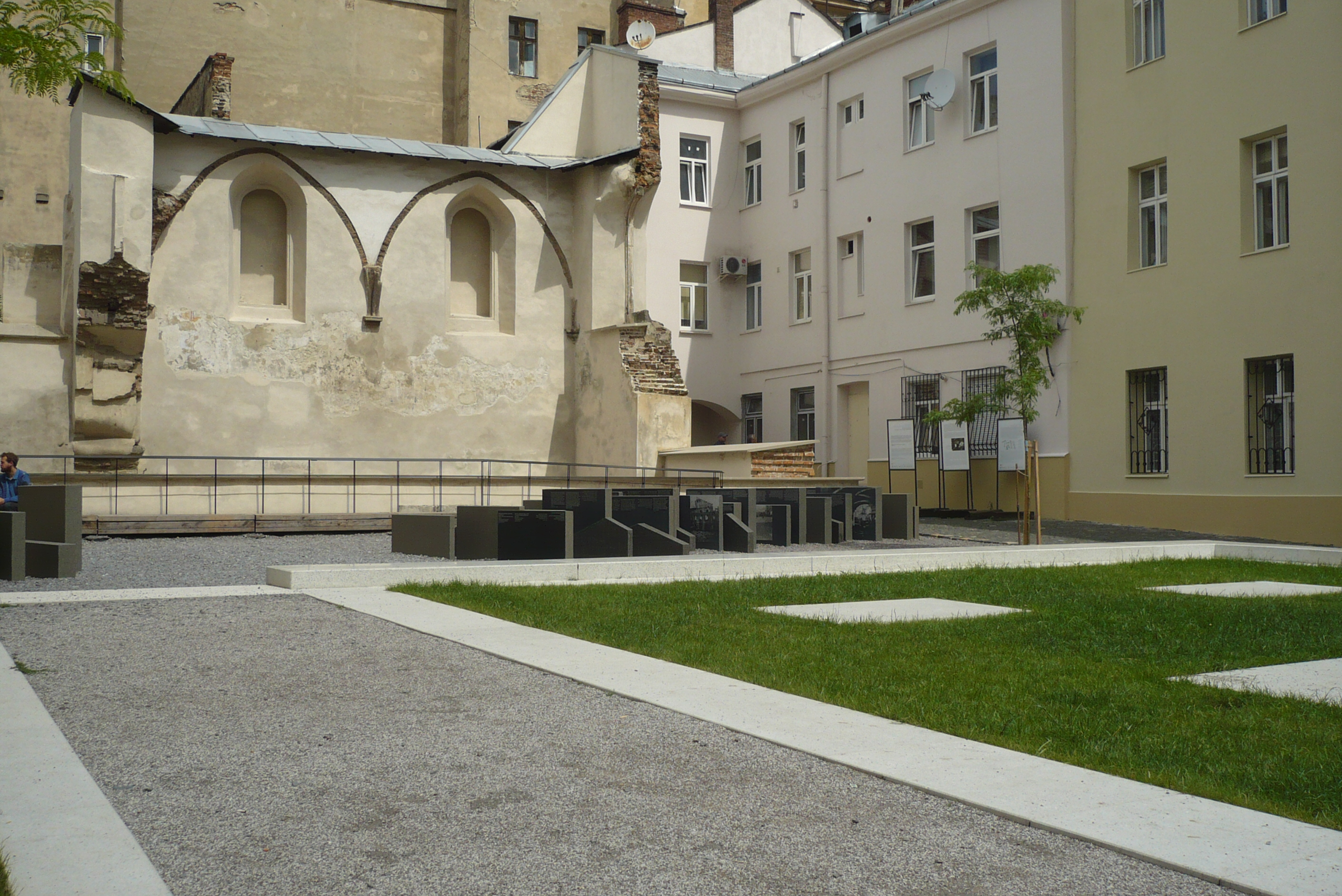 Synagoga Złota Róża we Lwowie. Pomnik